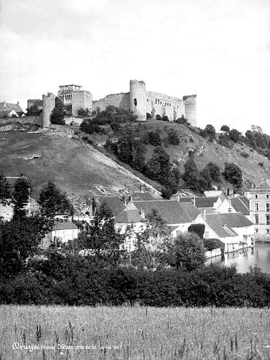 Druyes-les-Belles-Fontaines Donjon depuis village photographe Séraphin-Médéric Mieusement